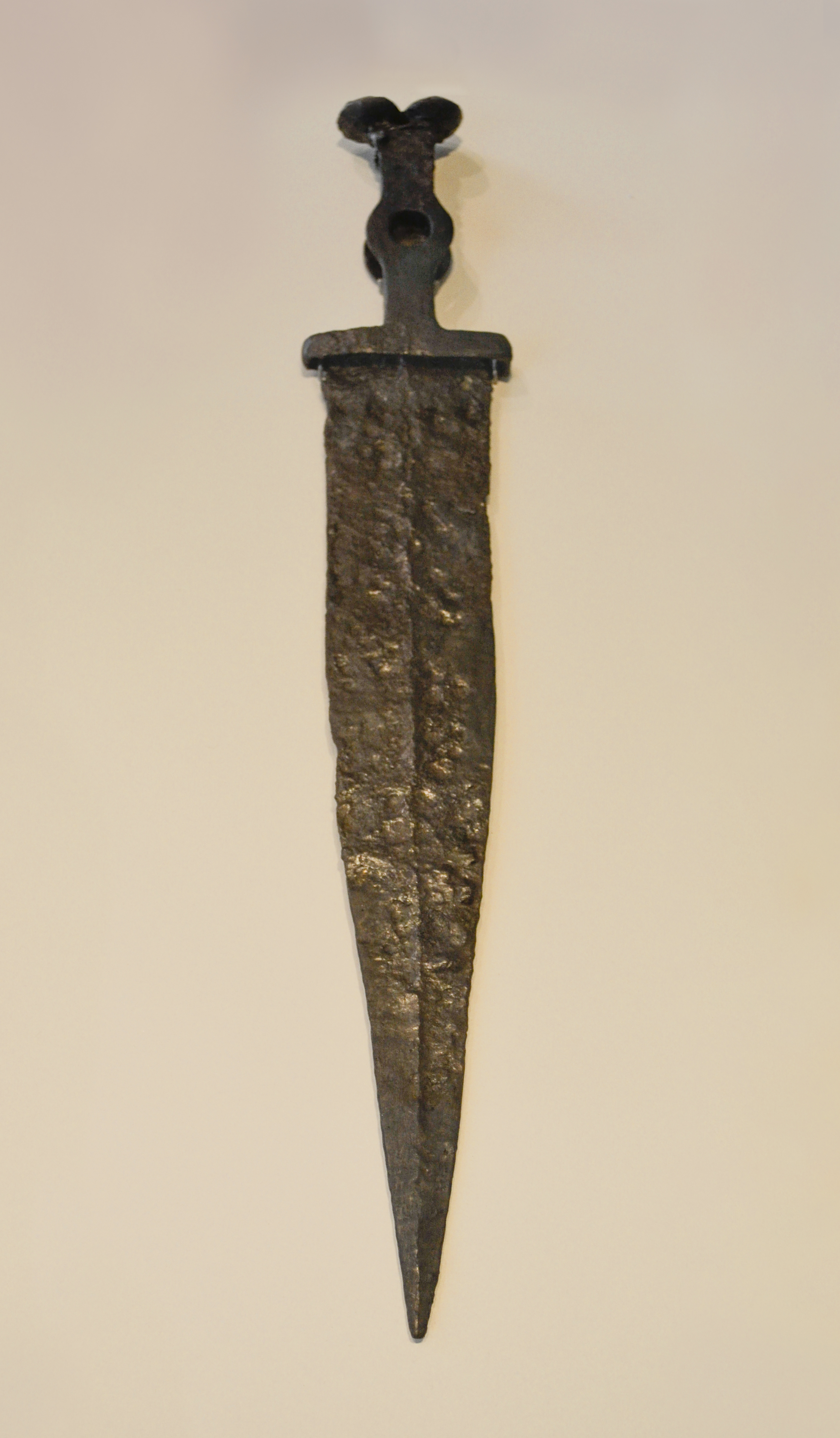 Espada celtíbera de antenas de la Necrópolis de de La Requijada de Gormaz. Tien el pomo compuesto de una lengüeta central y dos externas con un ensanchamiento central en forma de círculo que se rematan en antenas. Siglo III a. C. Técnica: Hierro forjado. Procedencia: Necrópolis de La Requijada de Gormaz (Gormaz, Soria). Longitud = 39,50 cm Empuñadura de espada: Longitud:10 cm; anchura : 3 cm. Hoja de espada: Longitud: 29,50 cm; anchura máxima : 5 cm. Guarda de empuñadura: Longitud: 6,50 cm. Pomo de espada: Anchura: 4 cm. Nº inv. 24448A. Museo Arqueológico Nacional de España.